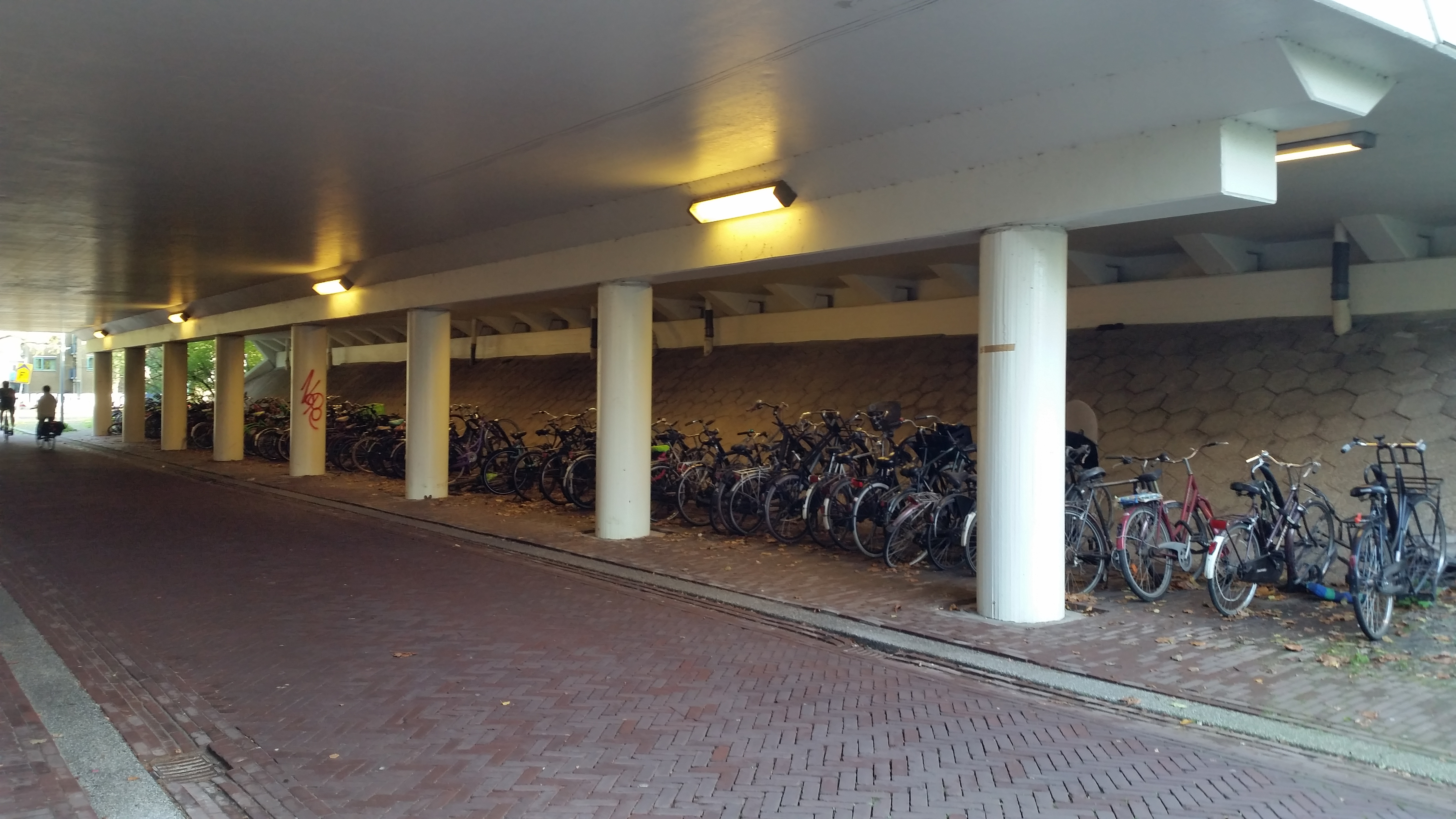 Onderdoorgang Brug Uilenstede